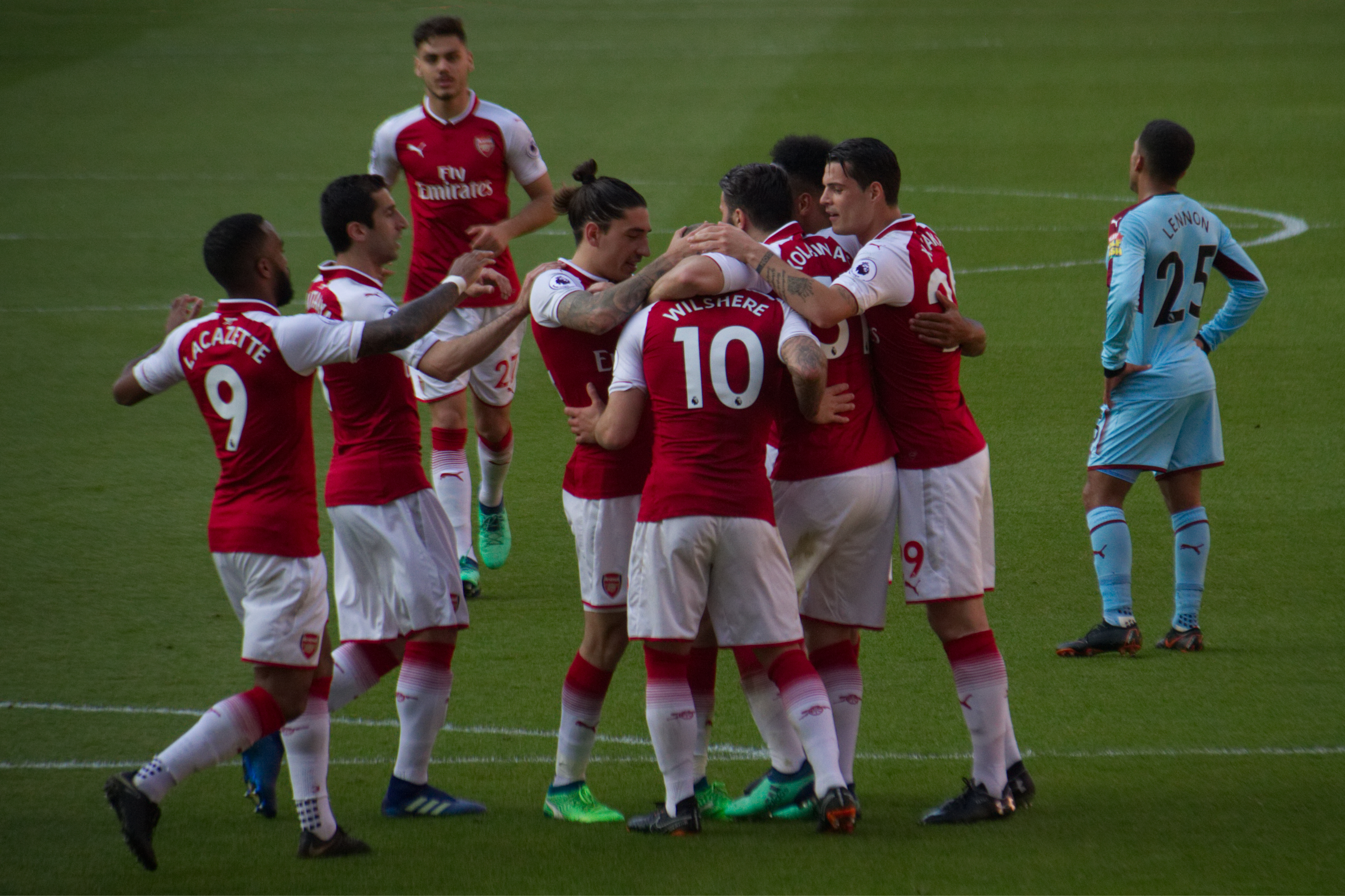 17 Merci Arsène - Celebrating Kolasinac's goal